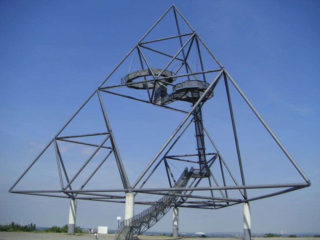 Das Tetraeder in Bottrop und Gelsenkirchen mit der Arena_AufSchalke im Hintergrund.